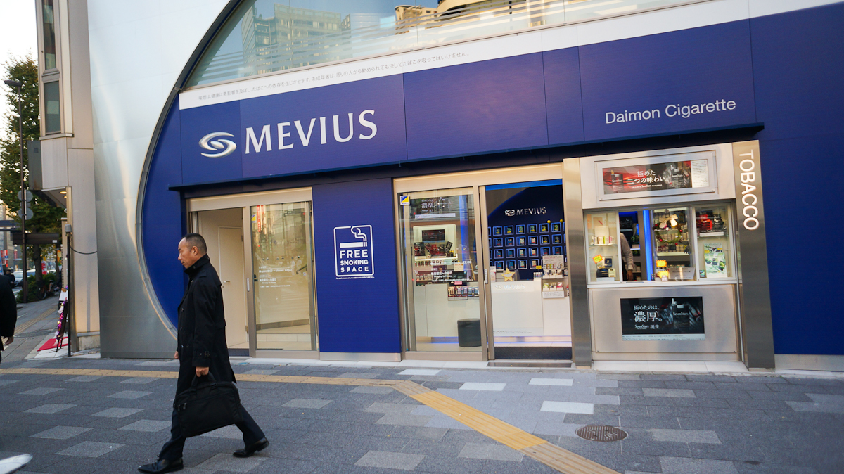 Fumar en Japón Puedes ver la entrada completa en